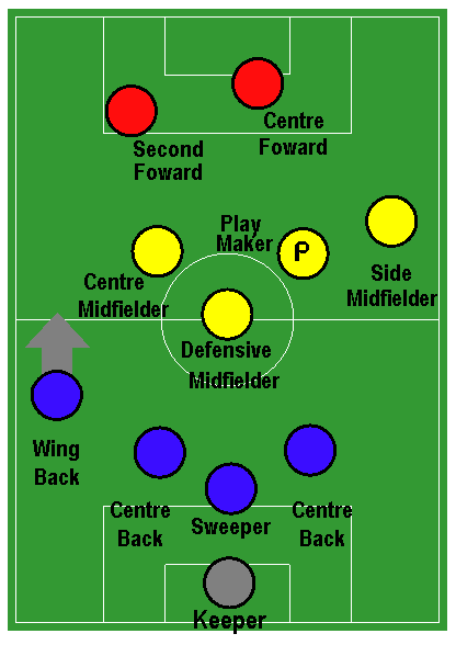 mia modifica del disegno di altre formazioni di altre pagine (ad. es. 3-5-2; 5-3-2; 4-4-2).